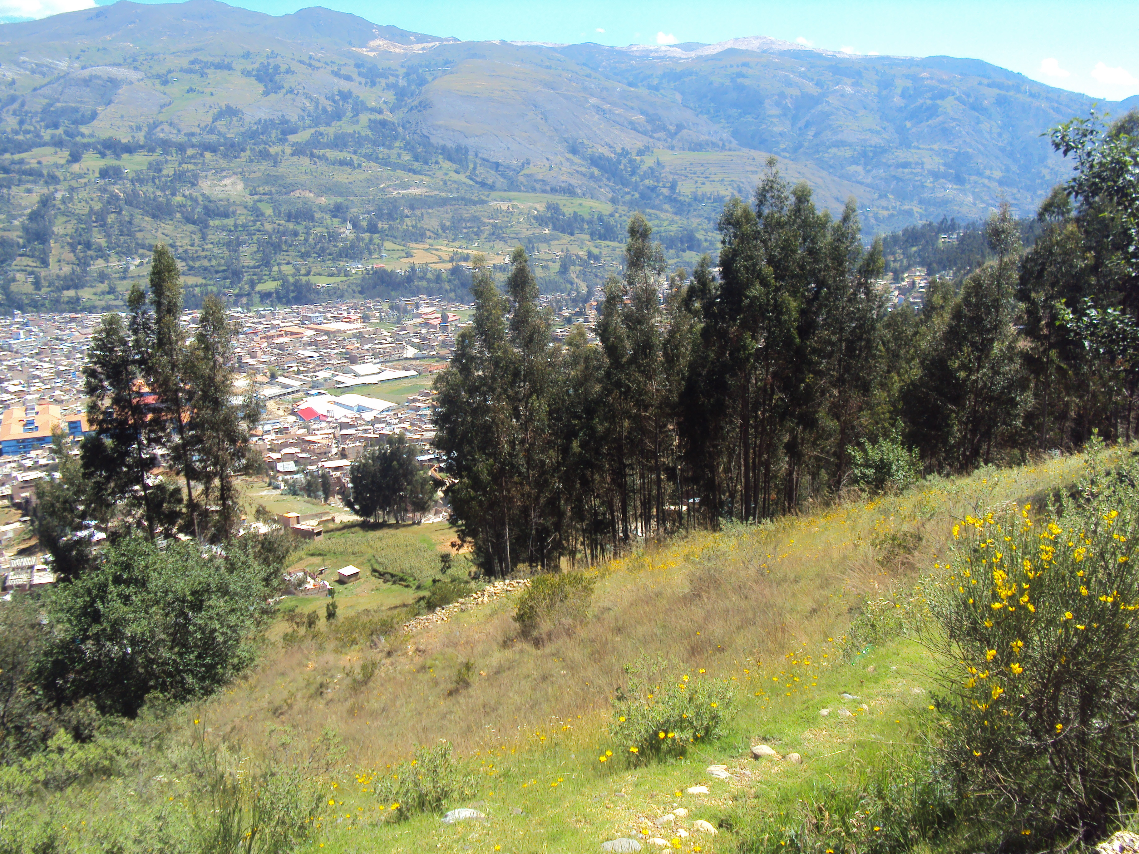 Vista parcial de Huaraz